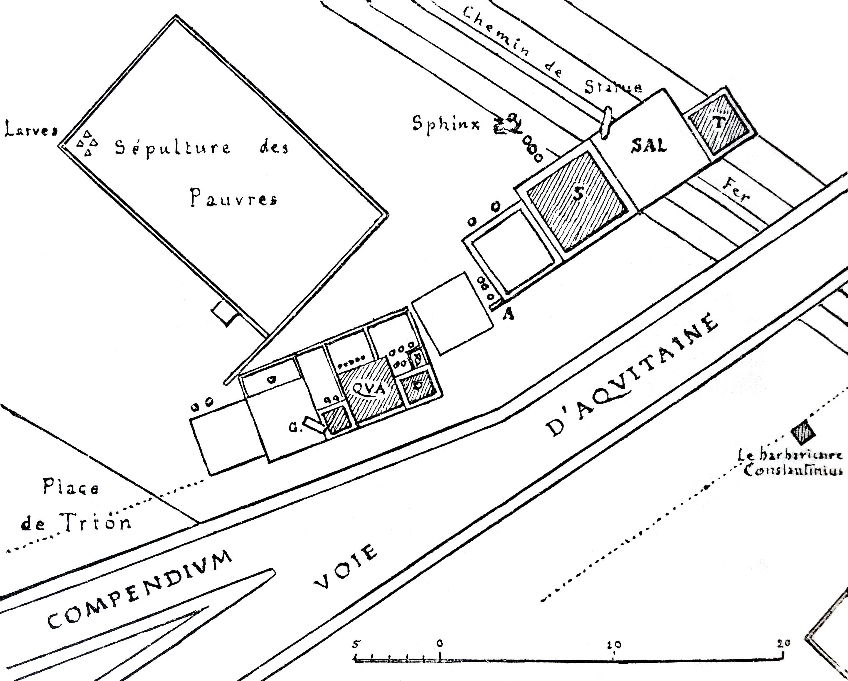 Plan de la voie et du compendium d'Aquitaine à leur débouché de Lyon. Au 1 - 500. Nota. Le plan est orienté exactement du nord au sud. D'après un plan de feu M. Thoubillon, architecte. (Cf. M. A. Allmer, les Fouilles de Trion, t. II, P. 271. Figure 279, page 230 du livre d'André Steyert, Nouvelle histoire de Lyon et des provinces, de lyonnais, Forez, Beaujolais, Franc-lyonnais et Dombes, tome premier, Antiquité depuis les temps préhistoriques jusqu'à la chute du royaume burgonde (534), illustré par l'auteur de 800 dessins, cartes, plans, etc. Lyon, Bernoux et Cumin, 1895.